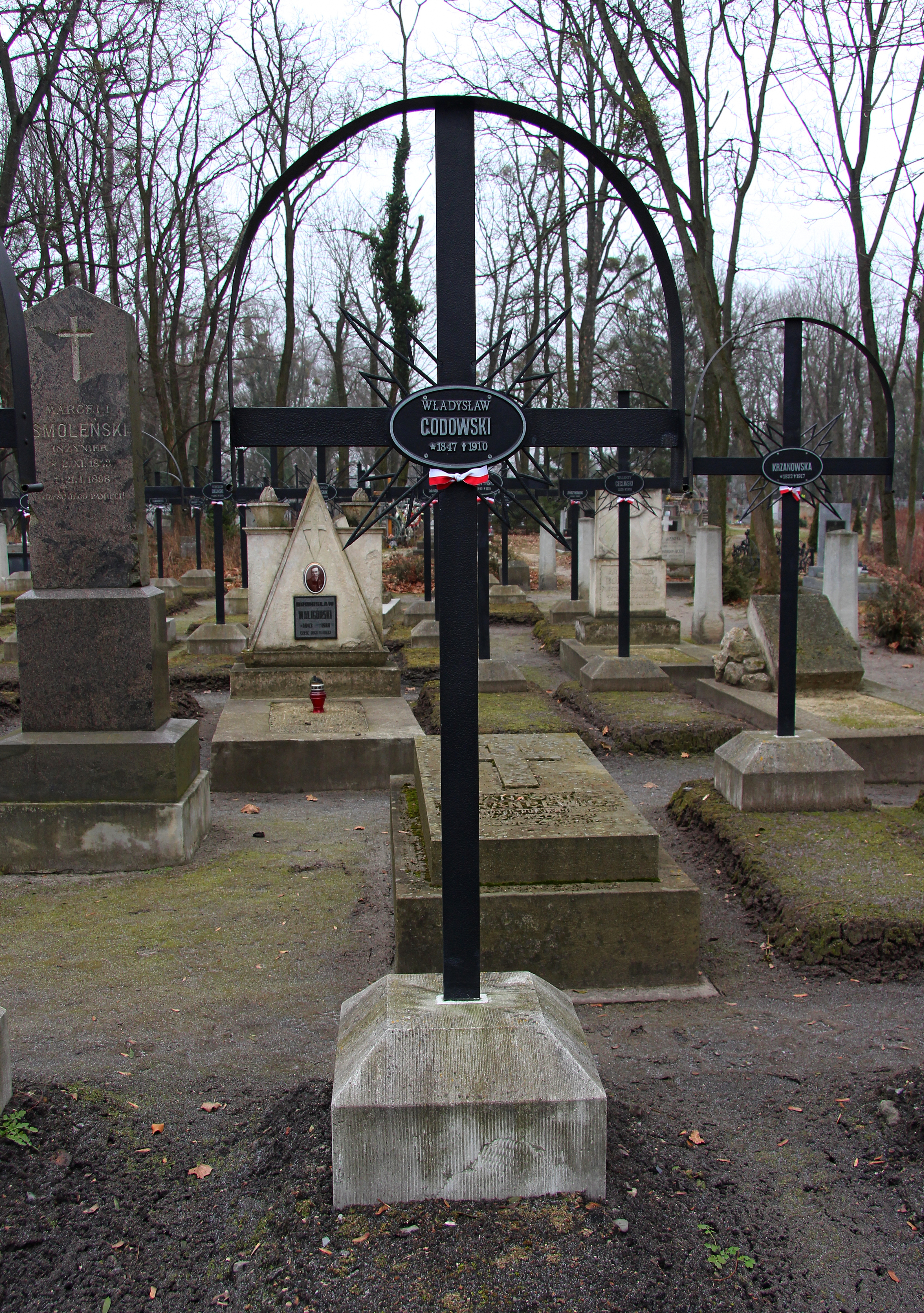 Могила арх. Владислава Годовського.Личаківський цвинтар , поле № 25.